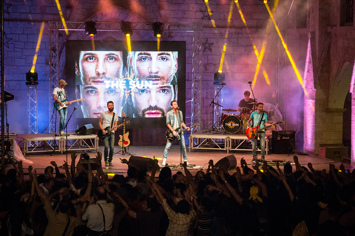 Performance live dei The Sun @ Betlemme (Palestina)